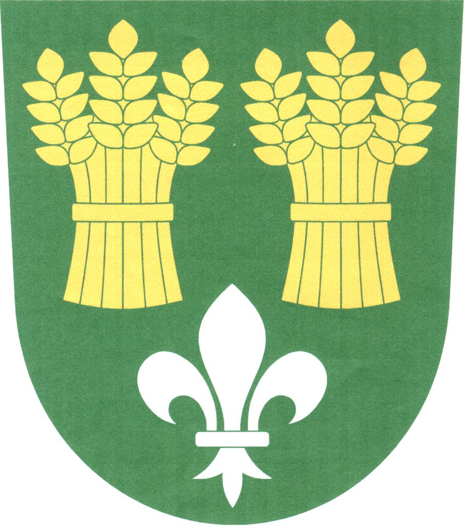 Znak obce Sedletín